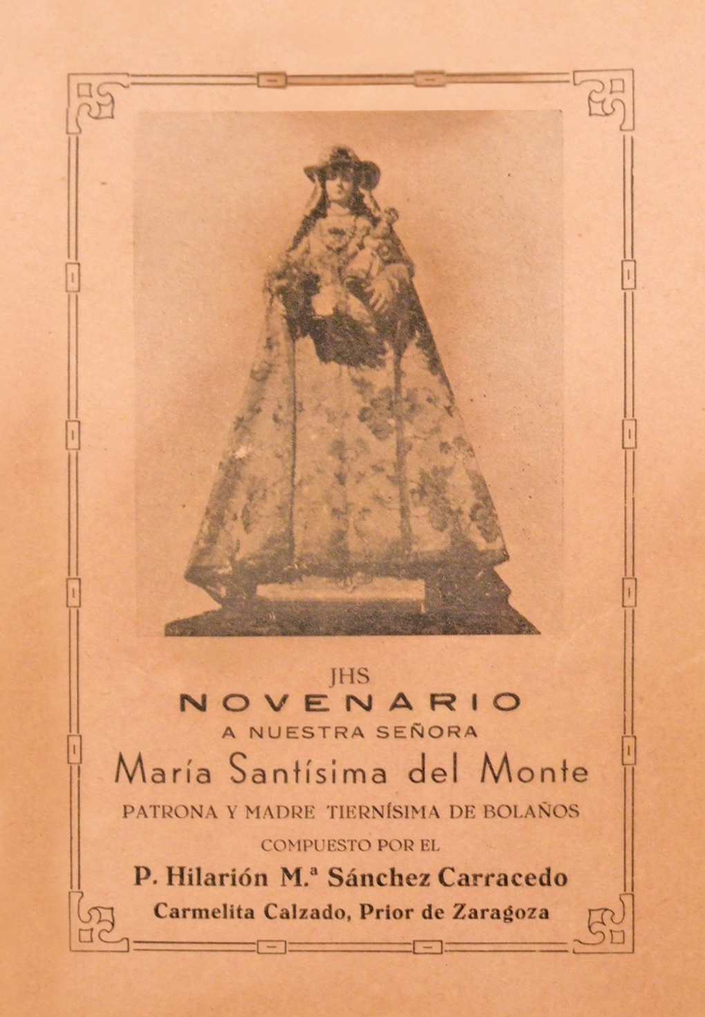 Novenario a Nuestra Señora María Santísima del Monte. Patrona y madre tiernísima de Bolaños. compuesto por el P. Hilarión Mª Sánchez Carracedo. Carmelita Calzado, Prior de Zaragoza.